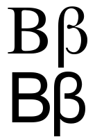 greek letter beta